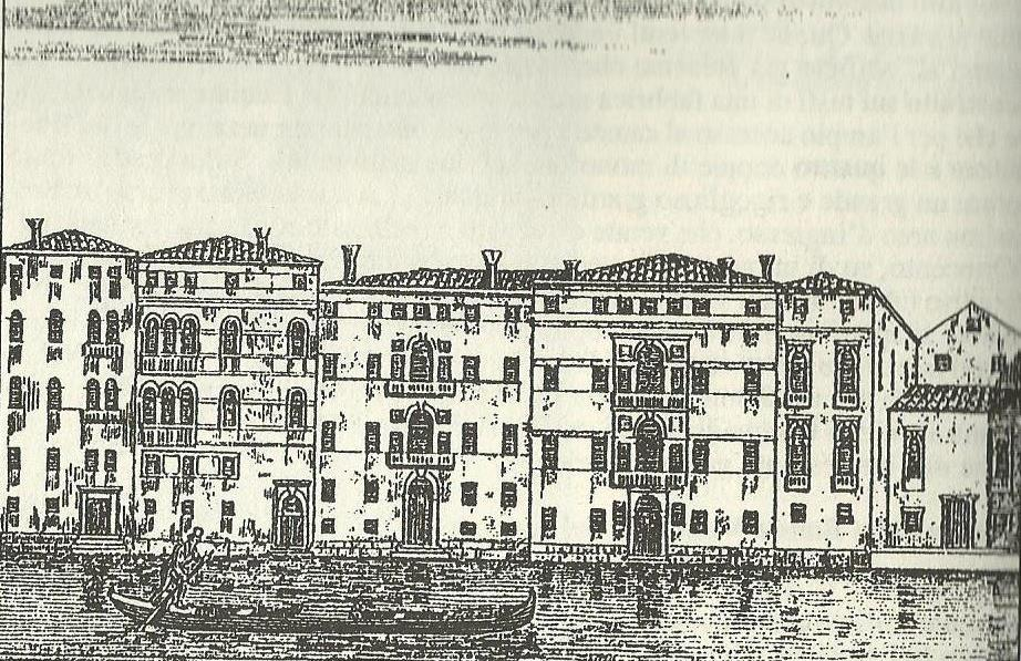 Palazzo e Palazzetto Barbarigo - incisione di primo '800, si tratta del Palazzo Barbarigo alla Maddalena